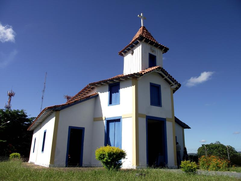 Capela do Senhor do Bom Fim, conhecida como Igreja dos Morrinos, em Montes Claros, Minas Gerais, Brasil.